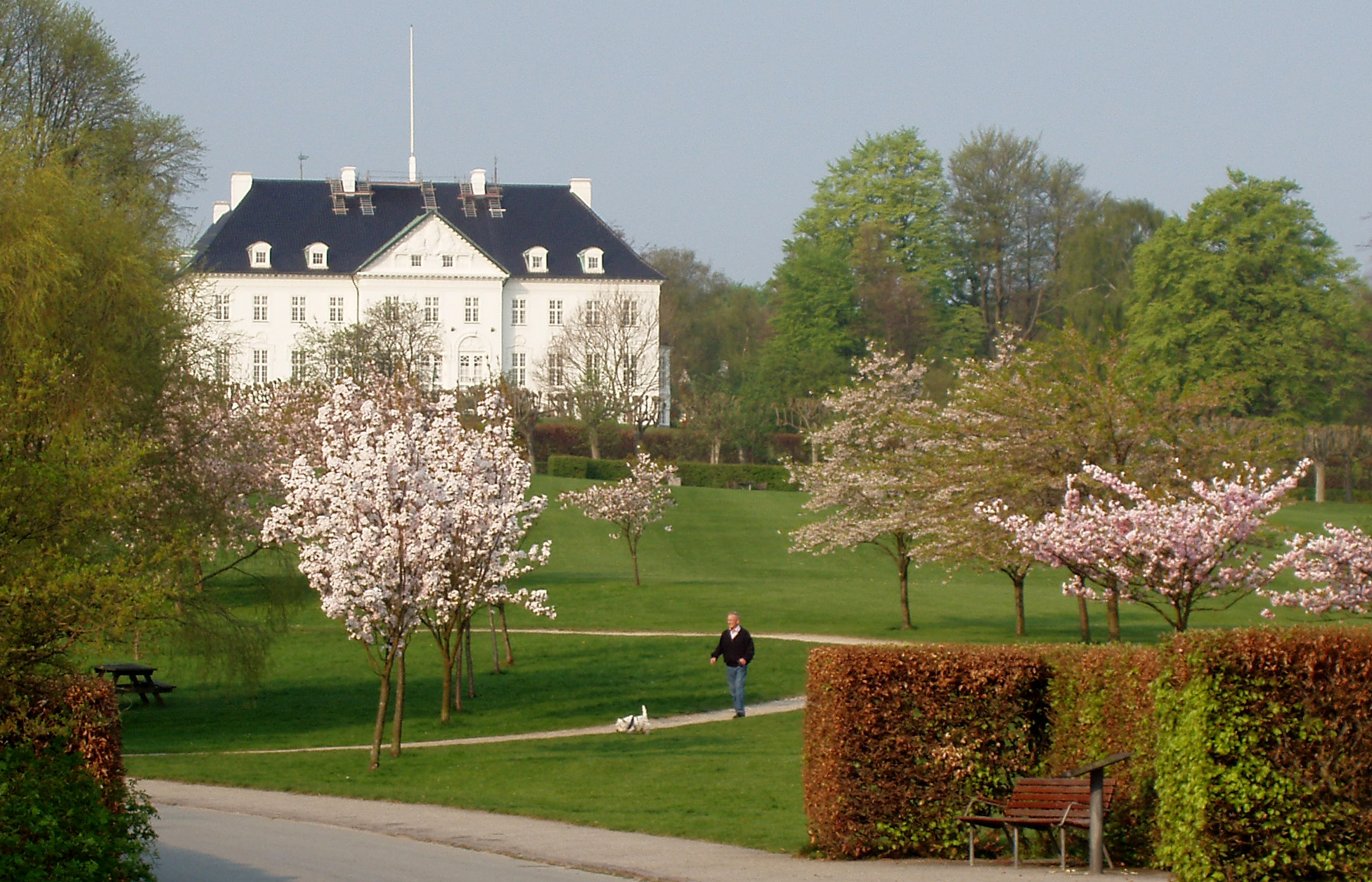 Marseliborg Slot set fra Mindeparken